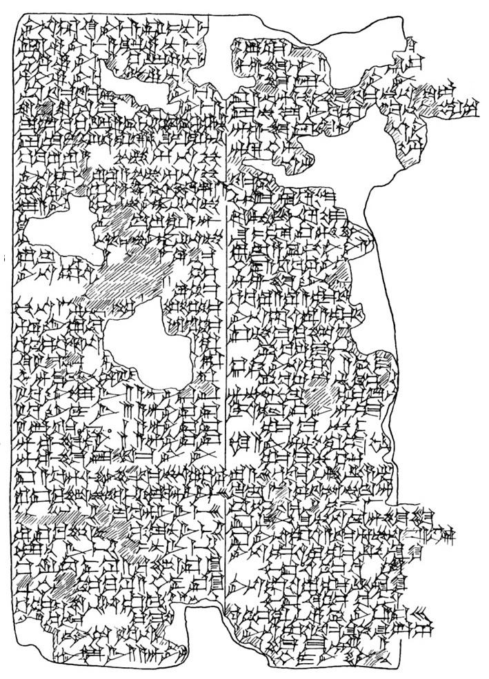 copie de la tablette du mariage de Martu et Adnigkidu CBS 14061